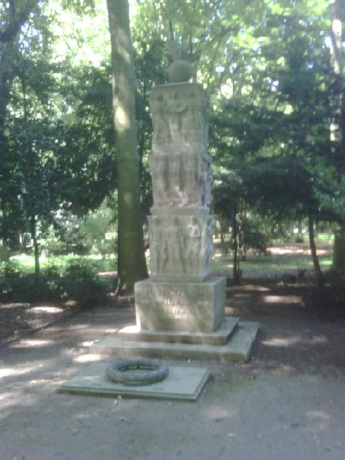 Ehrenmal 1. Westfälisches Feldartillerie-Regiment Nr. 7